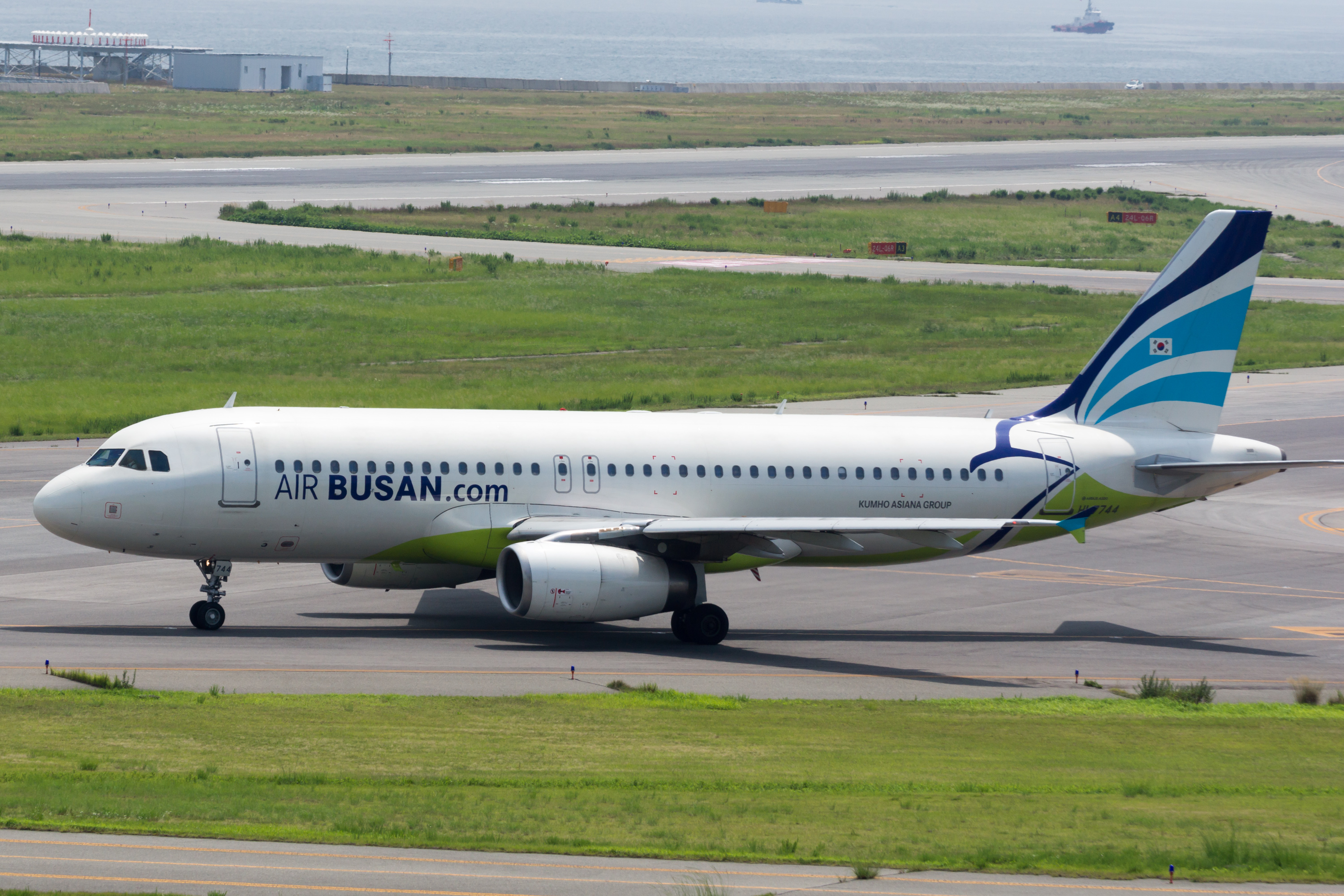 Air Busan / 에어부산 / エアプサン Airbus A320-232 HL7744 BX12, Departed to Busan Osaka Kansai Int'l Airport